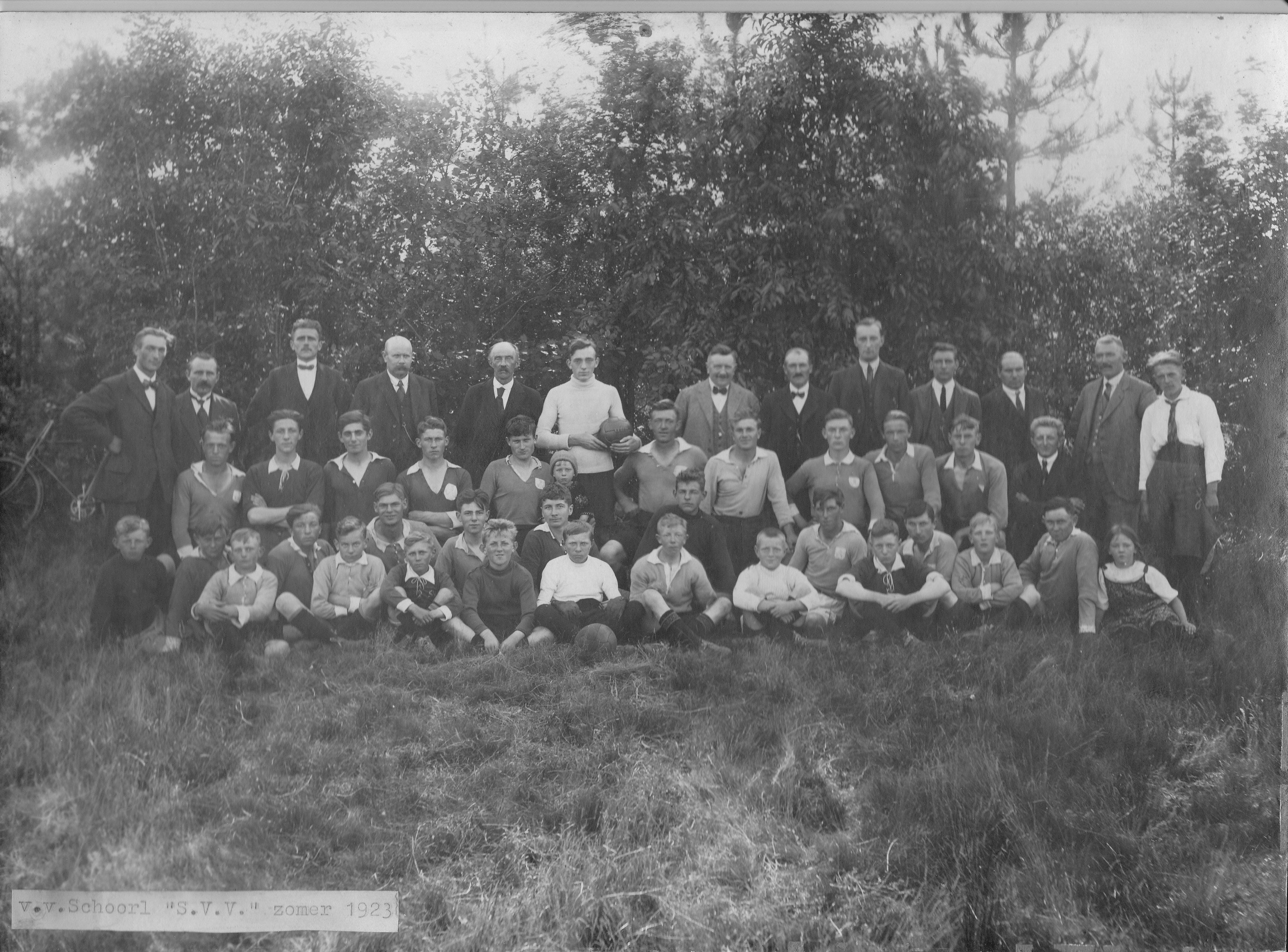 Voetbal schoorl 1923